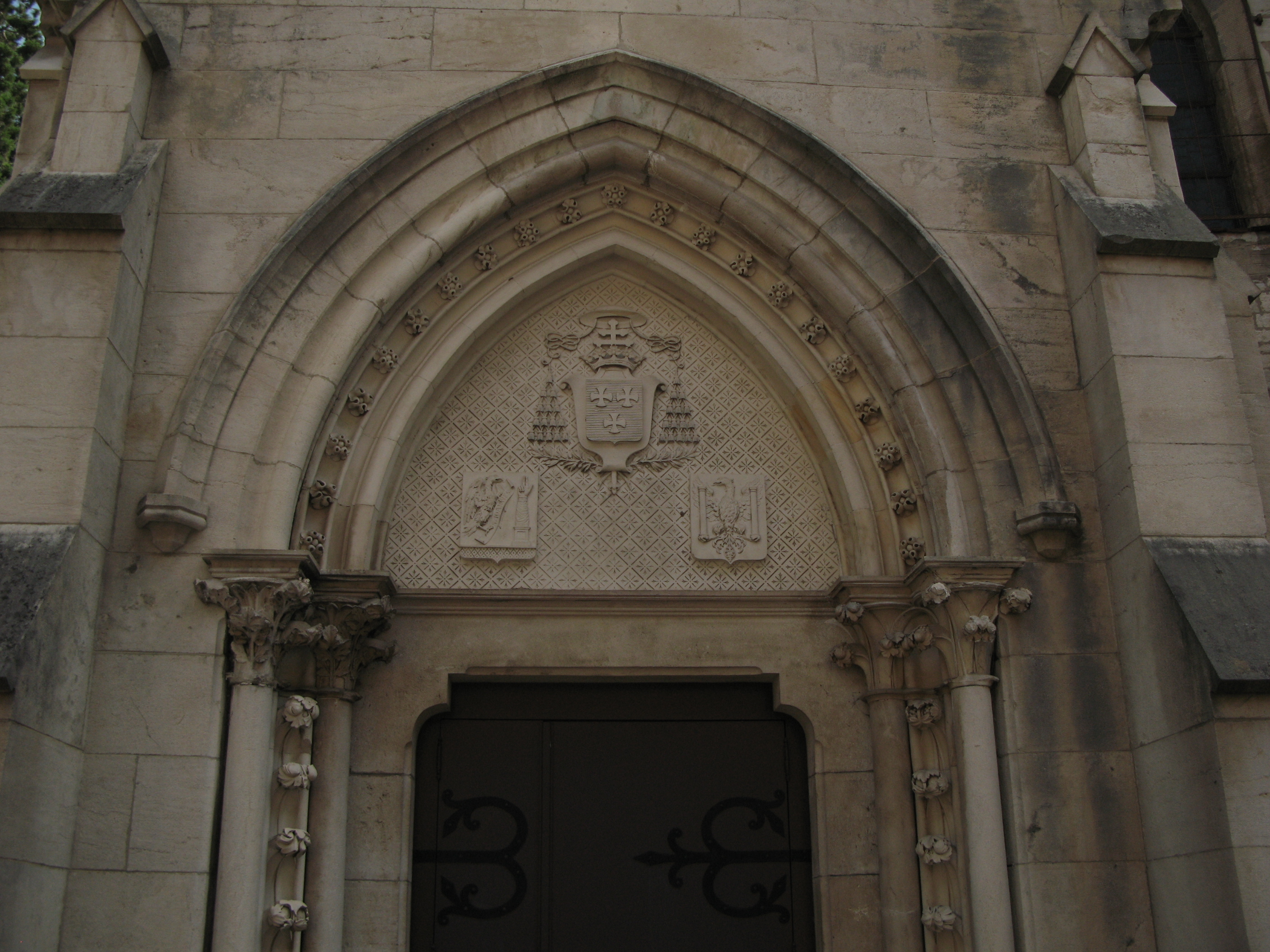 Cathédrale Saint Jean de Besançon, portail occidental. En haut : armes du cardinal Césaire Mathieu, archevêque de Besançon. A gauche, blason de l'archidiocèse de Besançon portant le bras de Saint Etienne et l'aigle de Saint Jean. A droite, blason de la ville de Besançon.